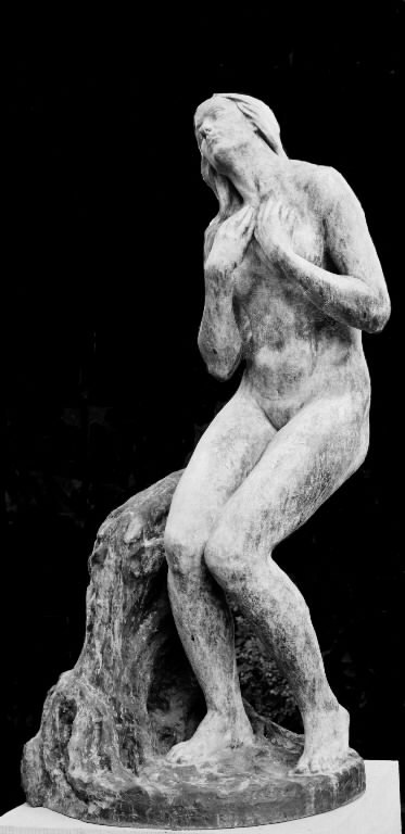 Niels Hansen Jacobsen (1861-1941), Dryaden, 1918